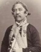 Bupati R. WIRANATA KUSUMAH IV (Dalem Bintang) Periode 1846-1874